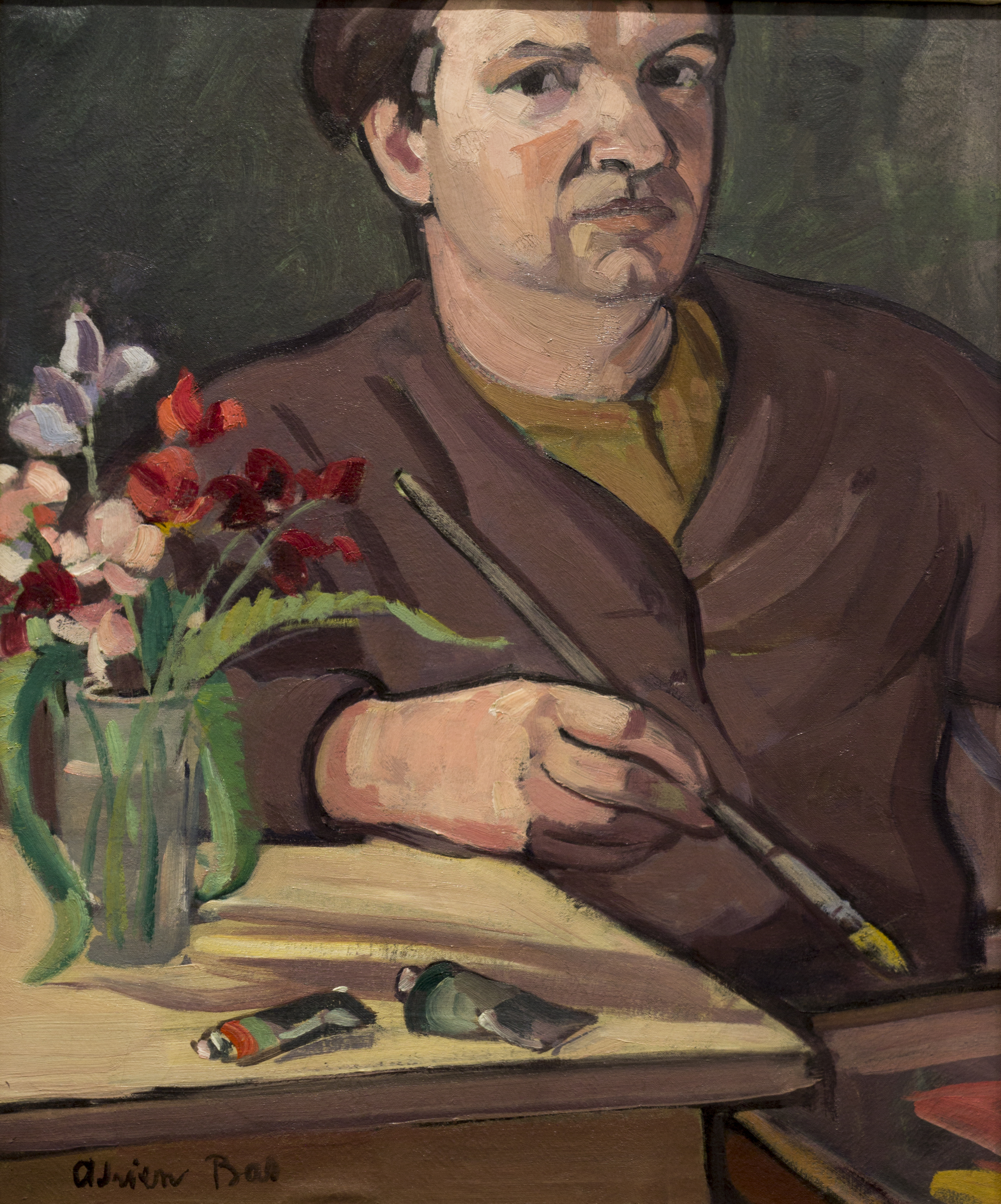 Portrait de l’artiste